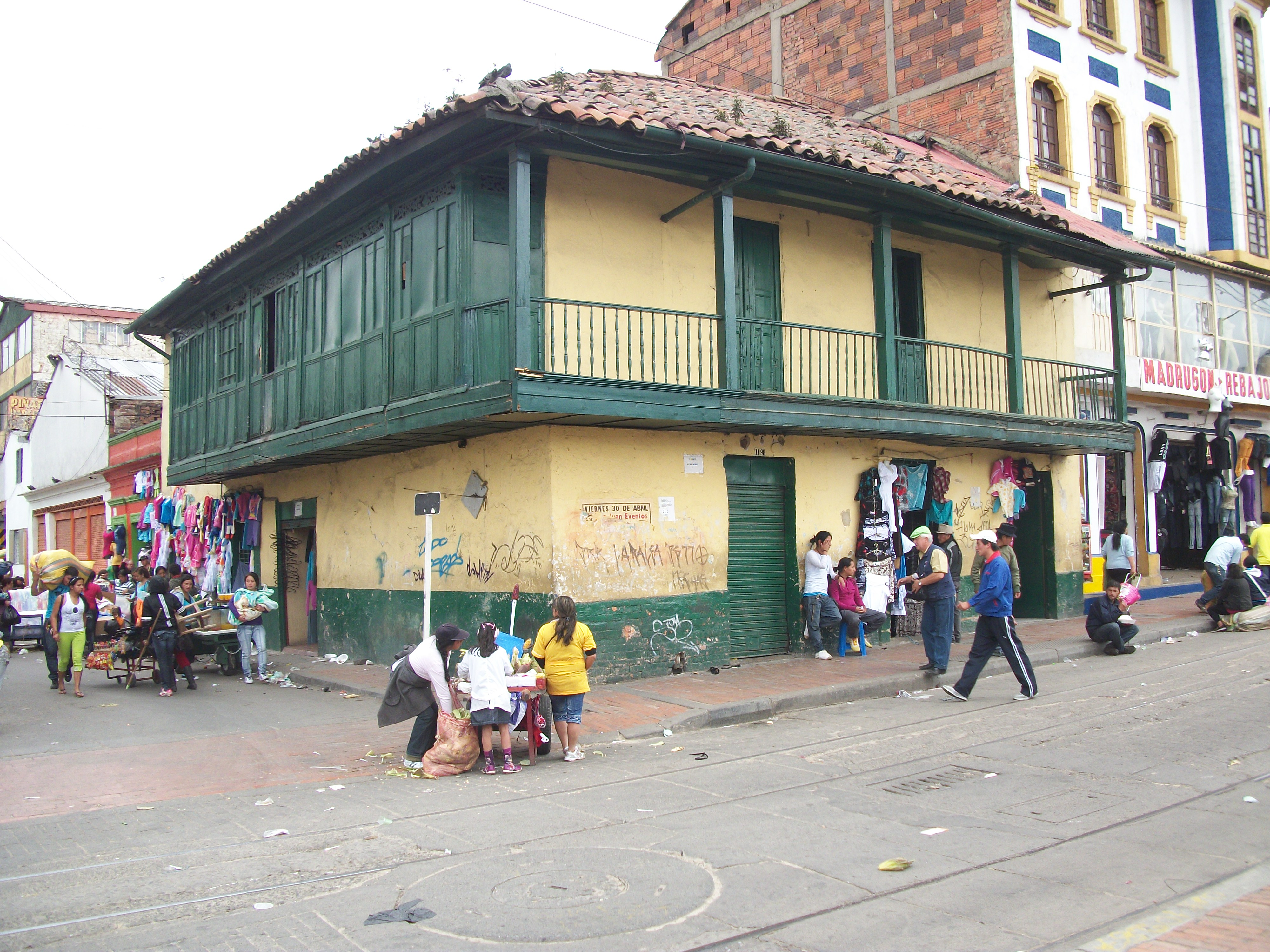 Bogotá, casa en el barrio Santa Inés,localidad de Santa Fe, calle 10 con carrera 11.JPG